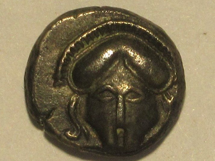 Diobol aus Mesembria, ca. 450-350 v.Chr., Szaivert/Sear 1896